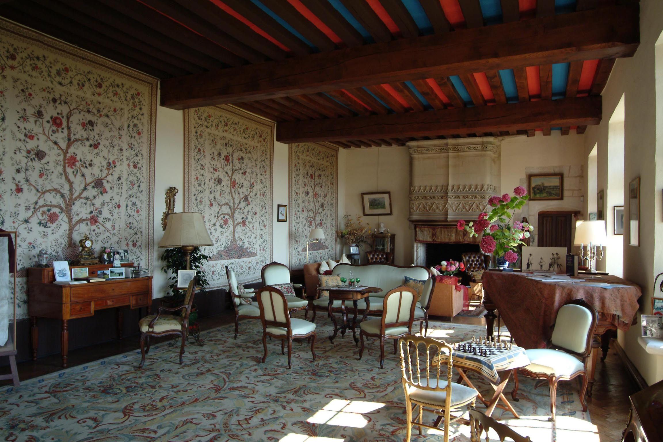 Grande Salle Château d'Etelan Photo Alain BOUDIER Libre de droits - Mention obligatoire